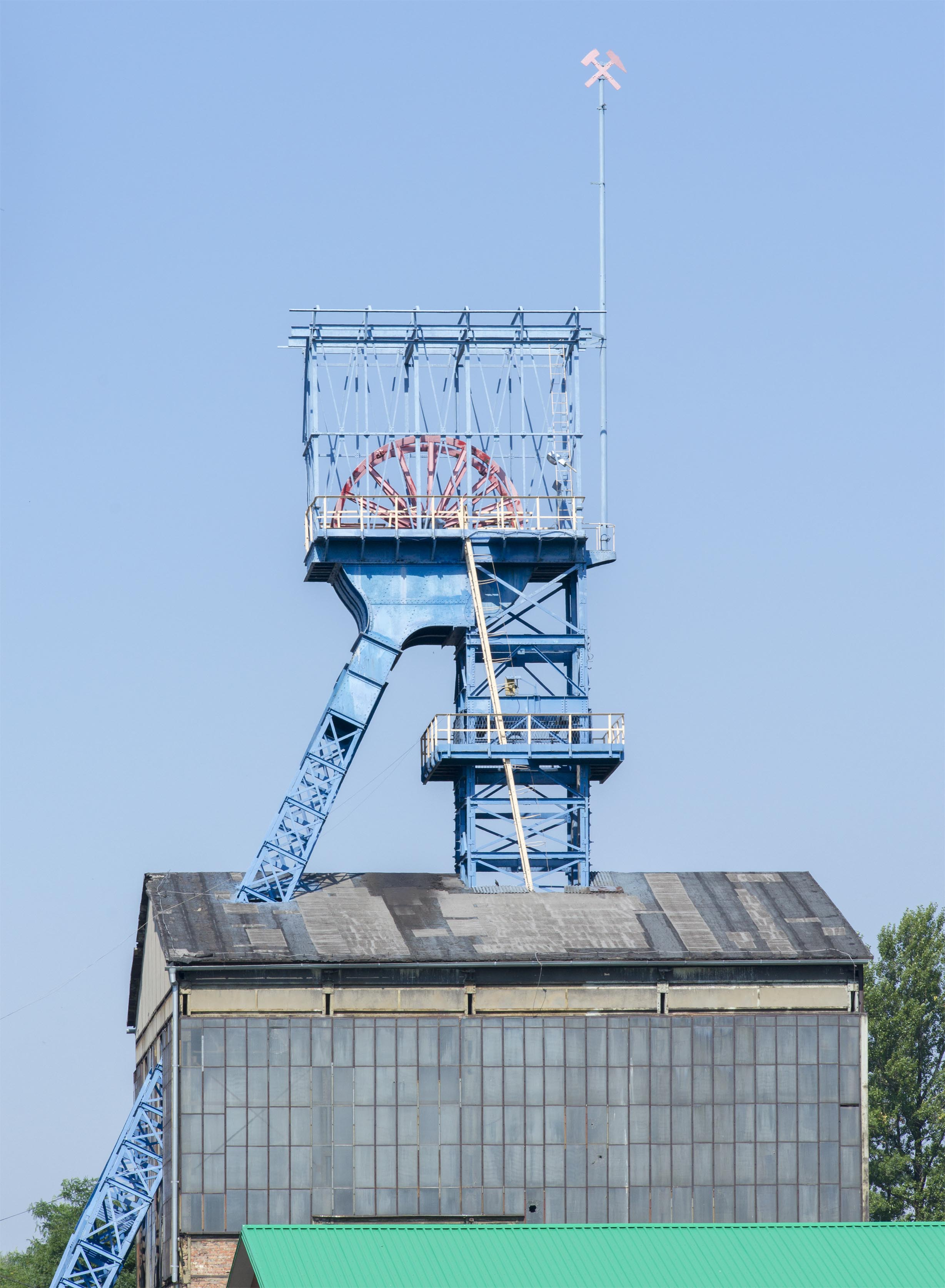 Wieża wyciągowa szybu Siemianowice III (Richter) kopalni węgla kamiennego Siemianowice w Siemianowicach Śląskich.